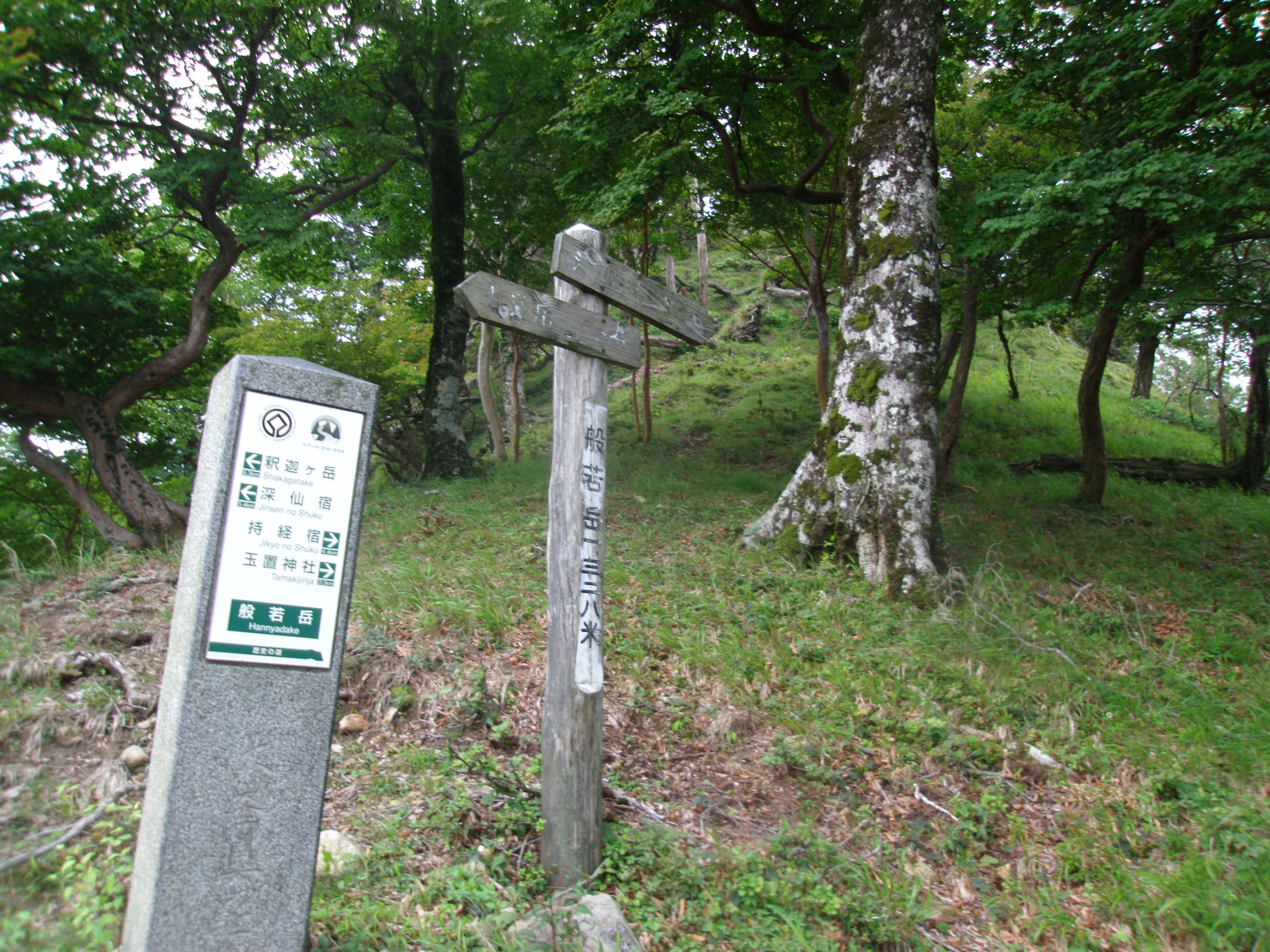 大峯奥駈道第25靡「般若岳」